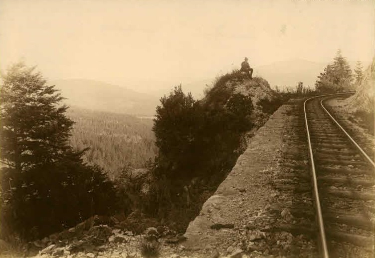 Aufstieg der Steinbeisbahn in der Nähe des Bahnhofs Ostrelj.